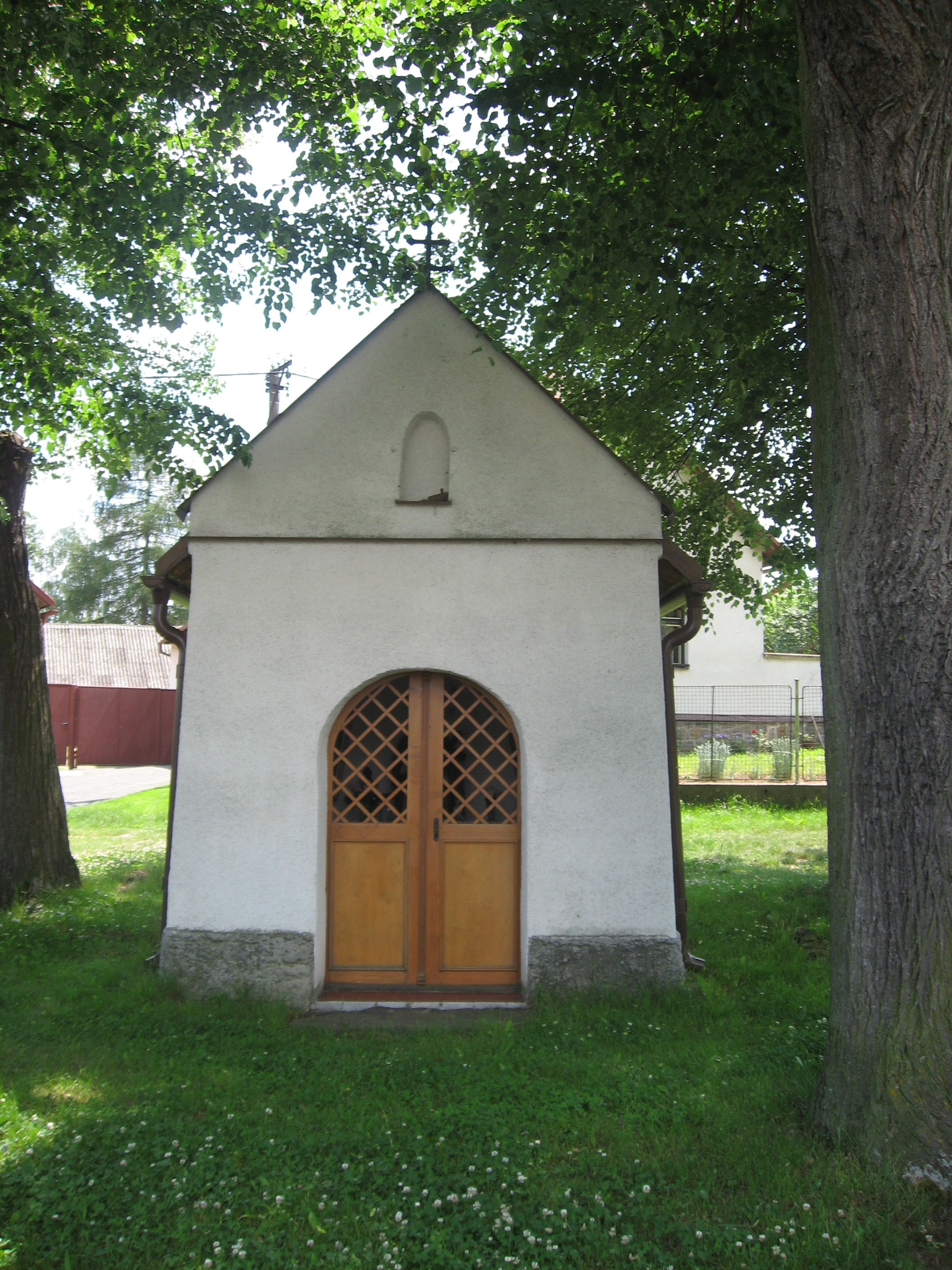 Okrouhlička, kaplička